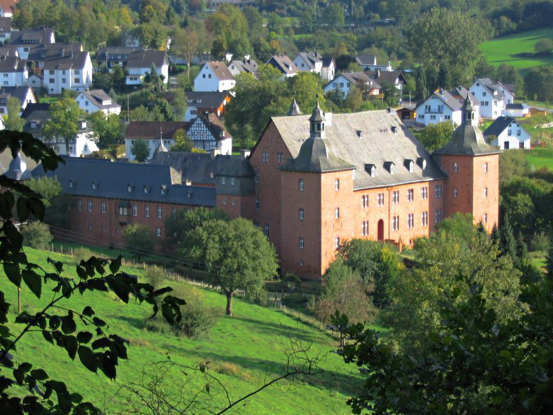 Schloss Adolfsburg bei Oberhundem in der Gemeinde Kirchhundem, NRW, Deutschland